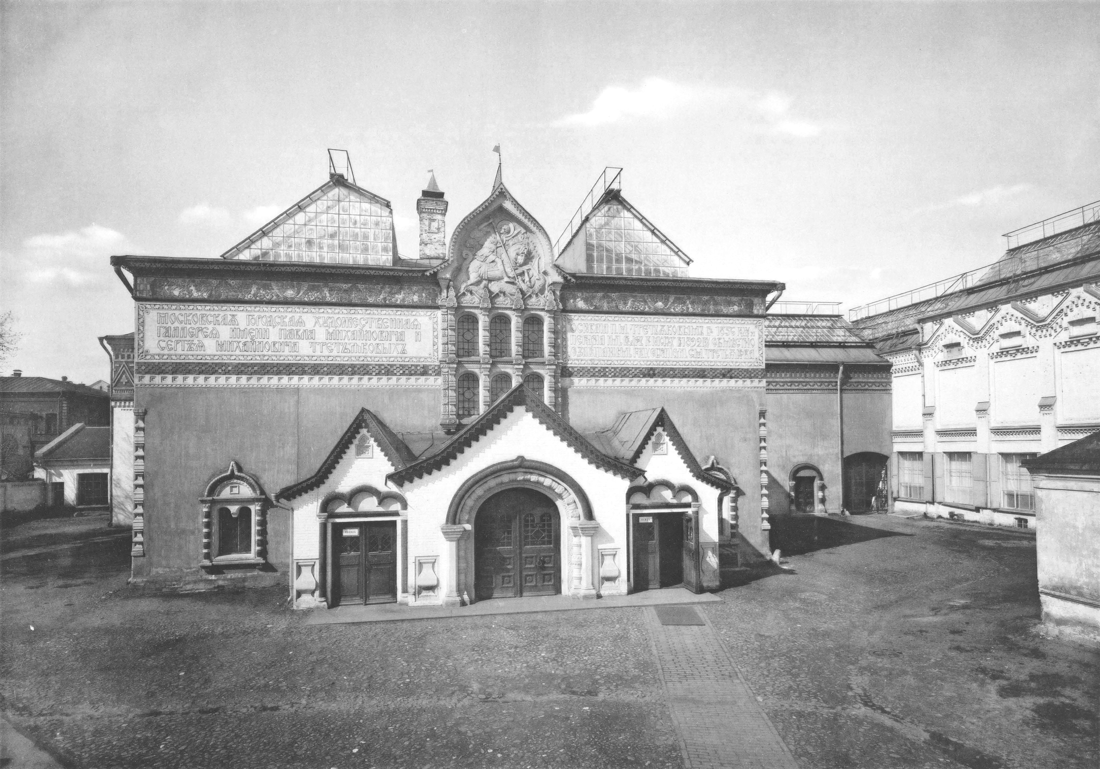 50. Городская художественная галлерея имени П. М. и С. М. Третьяковыхъ въ Лаврушинскомъ пер. (Москва)